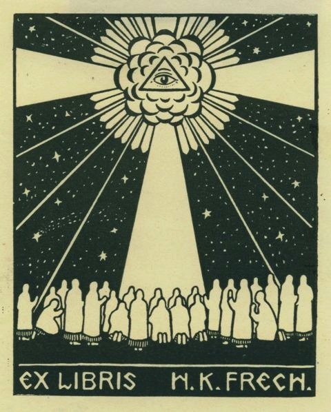 Ex Libris von Karl Frech, deutscher Kunstmaler, Zeichner und Graphiker